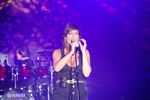 Roberta Faccani da Flickr